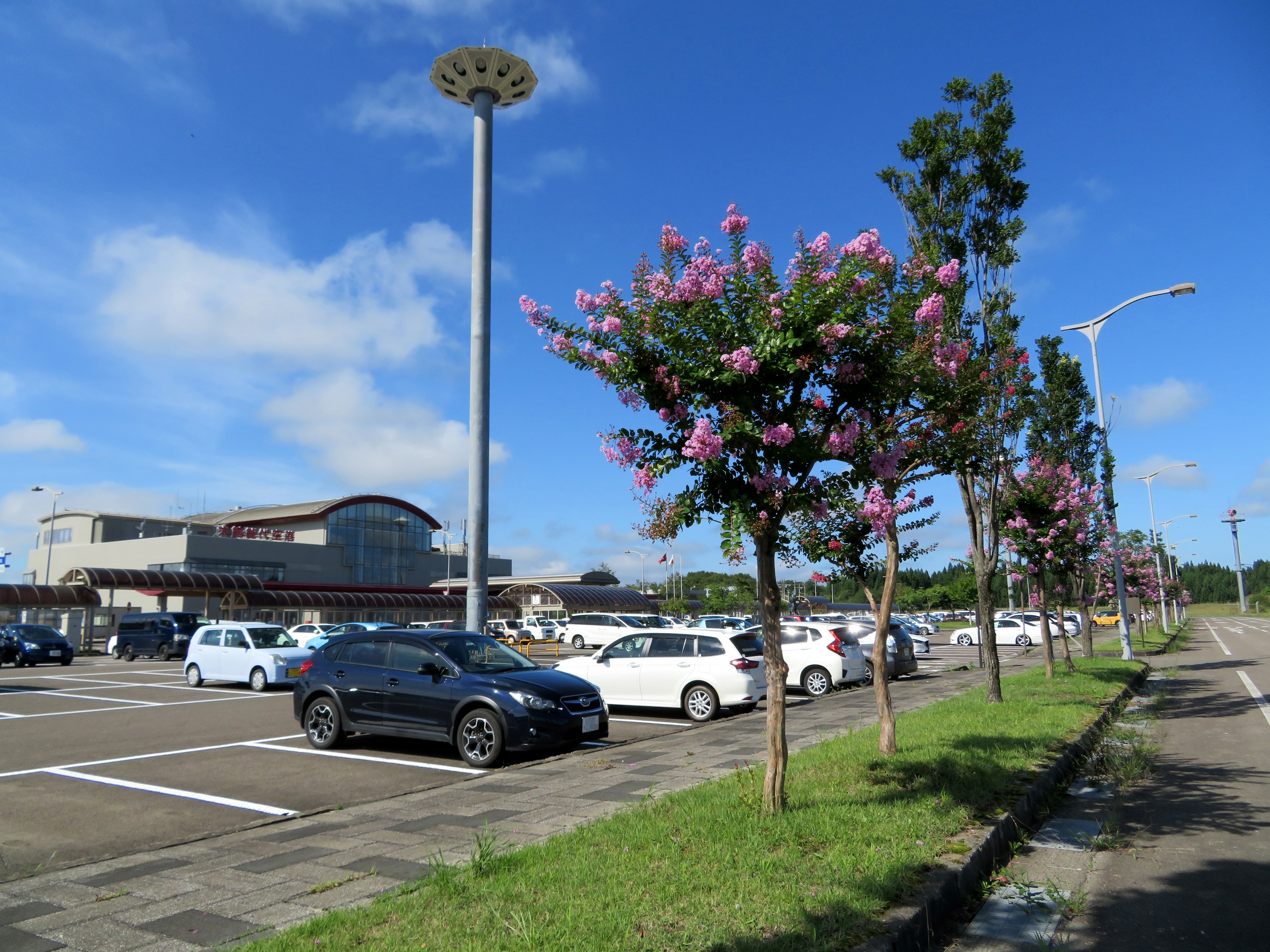 大館能代空港